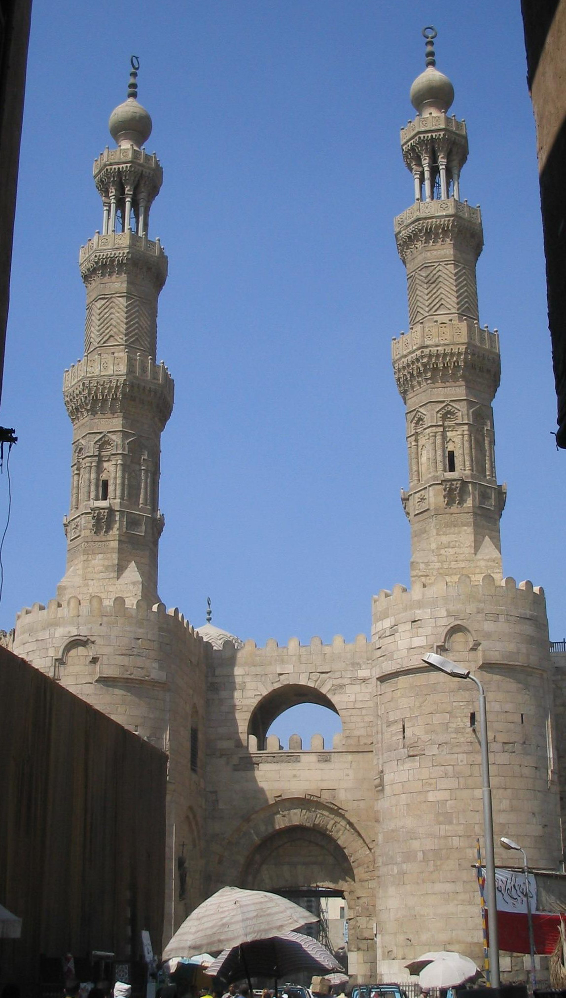 Cairo gate